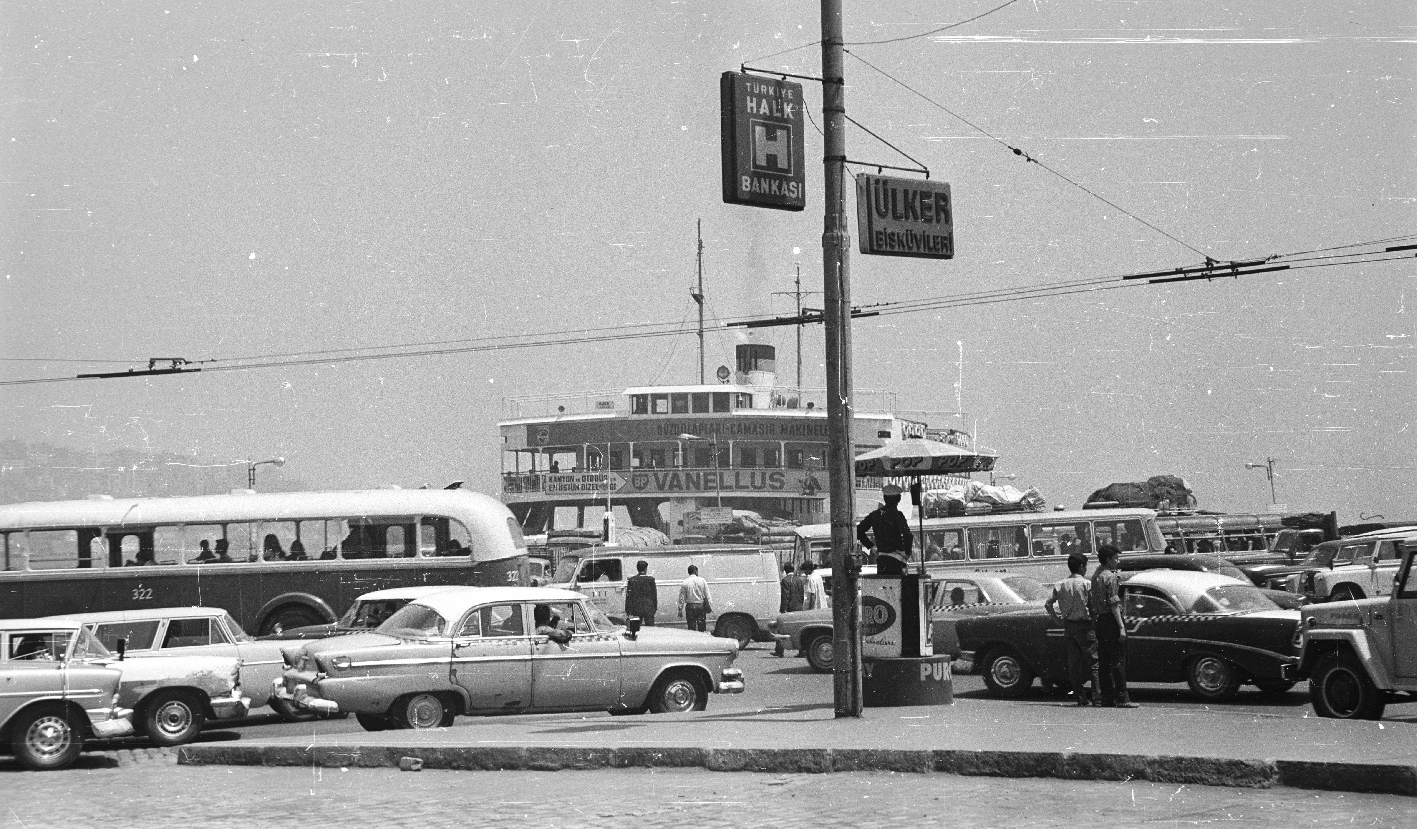 a Galata híd környéke. Location: Turkey, Istambul Tags: ship, bus, taxicab, automobile Title: a Galata híd környéke.